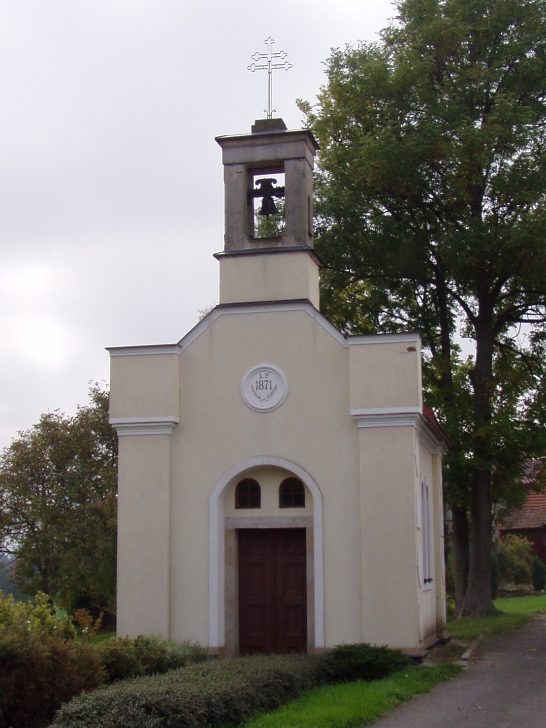 Kostel Panny Marie (Tis)